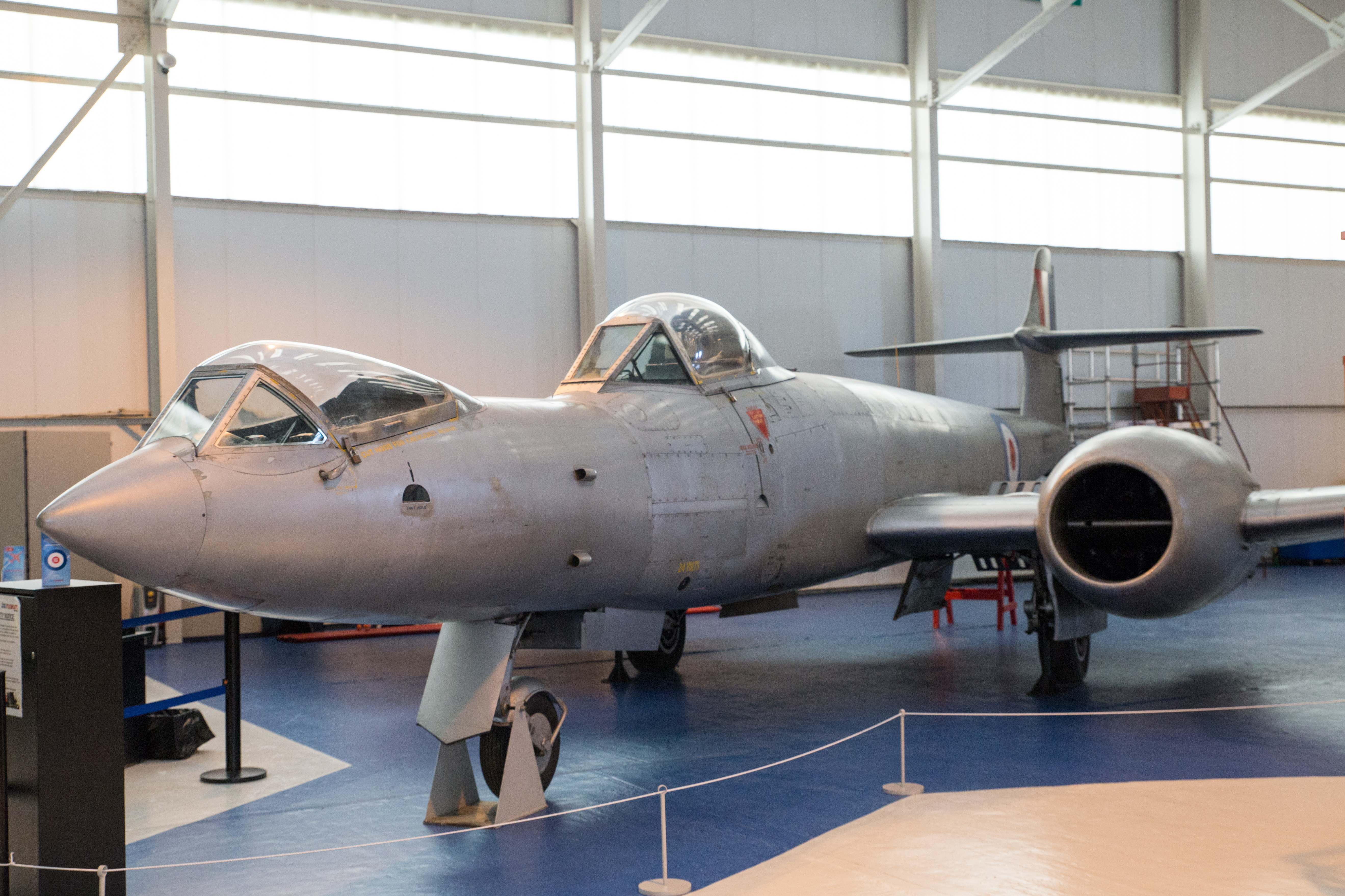 Gloster Meteor